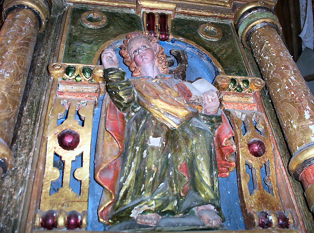 Kościół w Brzesku koło Pyrzyc - ambona